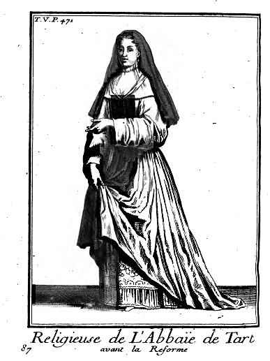 Représentation de la tenue d'une religieuse de l'abbaye de Tart avant la réforme